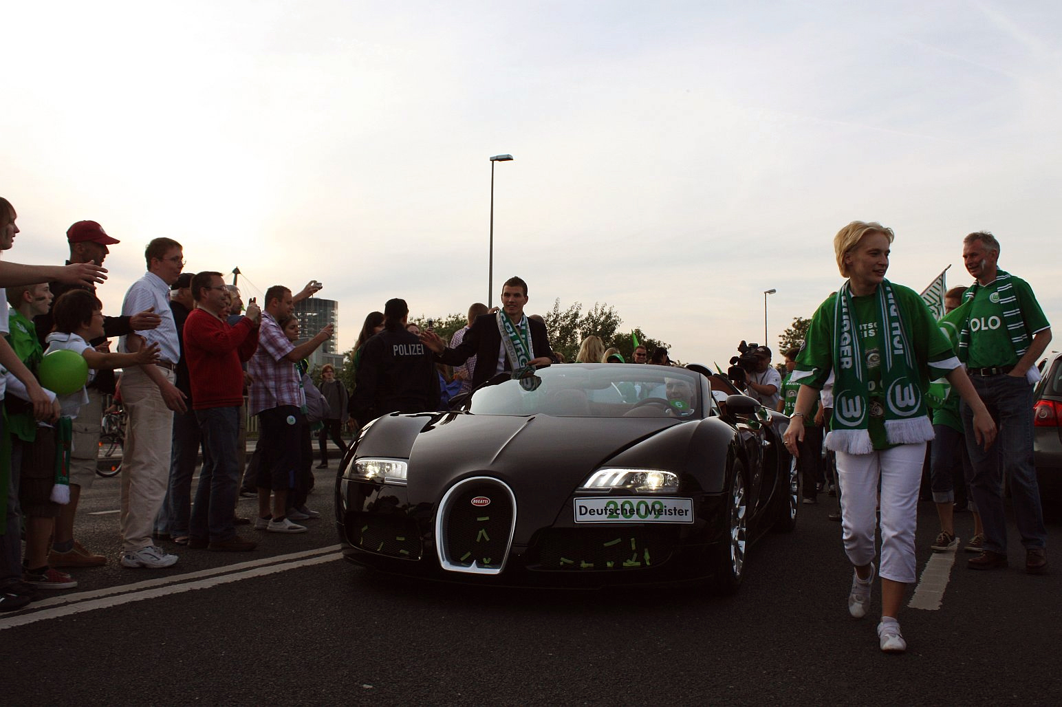 Deutscher Meister 2009 - VfL Wolfsburg. 23.05.09 Edin Dzeko feiert die Meisterschaft